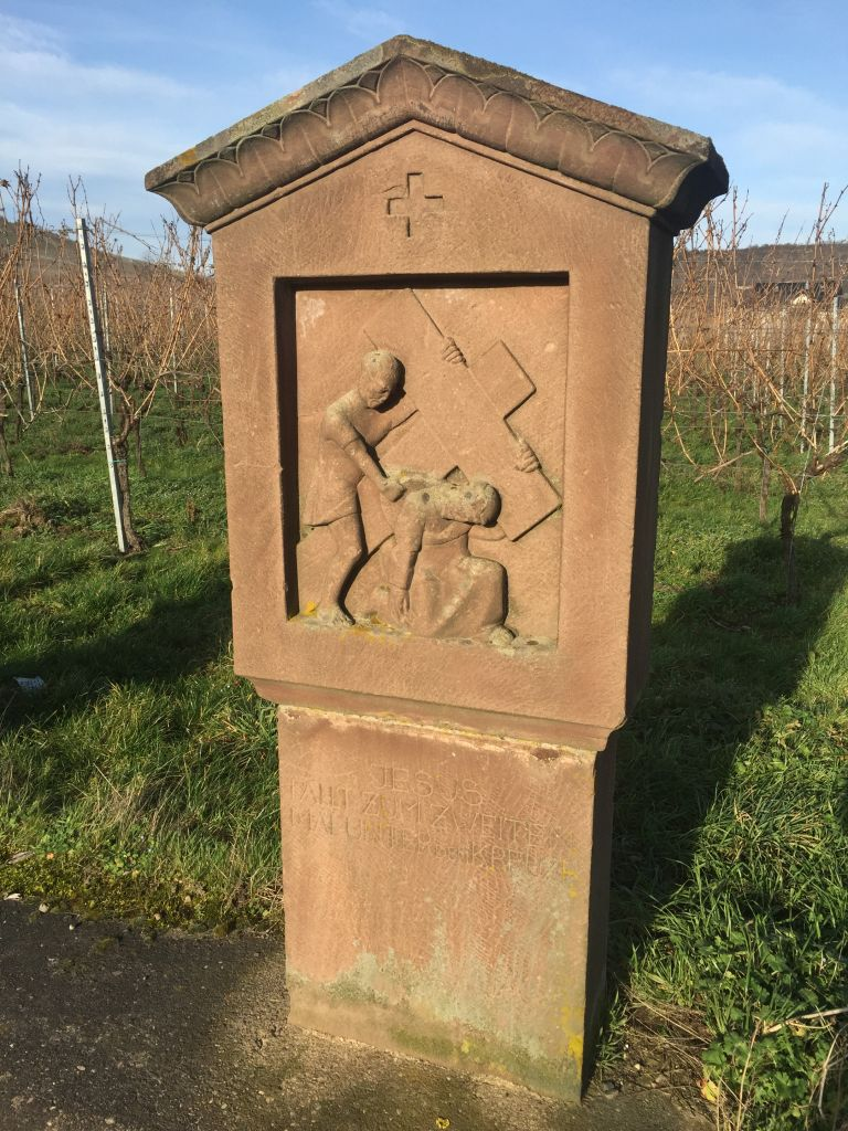 Kreuzweg Trittenheim - Station 6 von 14